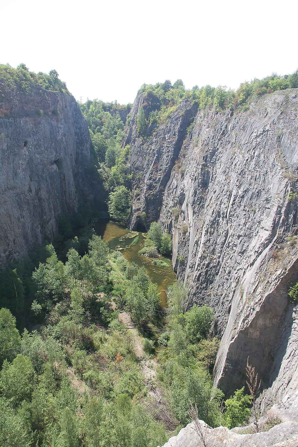 lom Mexiko (Trestanecký lom), District Beroun, Czech Republic autor:Prazak Date: 17. 8. 2006